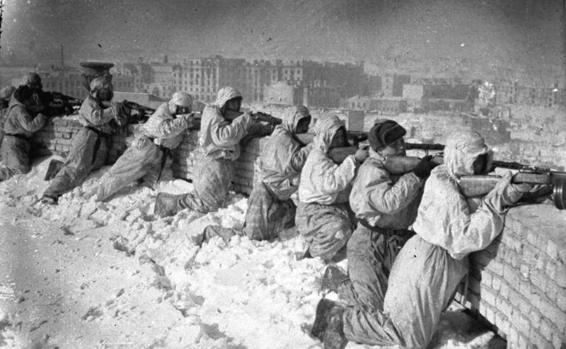 Russland, Kesselschlacht Stalingrad ADN-ZB/Archiv/ II. Weltkrieg 1939-45 Die Stalingrader Schlacht begann im Juli 1942. In erbitterten, beiderseits verlustreichen Kämpfen wehrte die Rote Armee das weitere Vordringen der faschistischen Truppen ab. Während der sowjetischen Gegenoffensive im November 1942 wurden über 300 000 Mann eingeschlossen. Die Reste dieser Verbände, etwa 91 000 Mann, kapitulierten am 31.3. und 2.2.1943 Rotarmisten bekämpfen vom Dach eines Hauses in Stalingrad den Gegner, Januar 1943